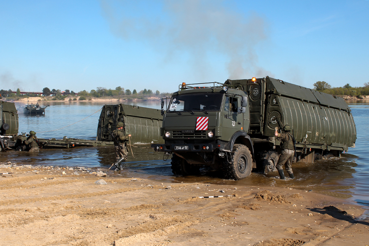 Наведение военнослужащими 28-й отдельной понтонно-мостовой бригады переправы через реку Оку в рамках испытания нового понтонно-мостового парка ПП-2005. 15 мая 2017 года.